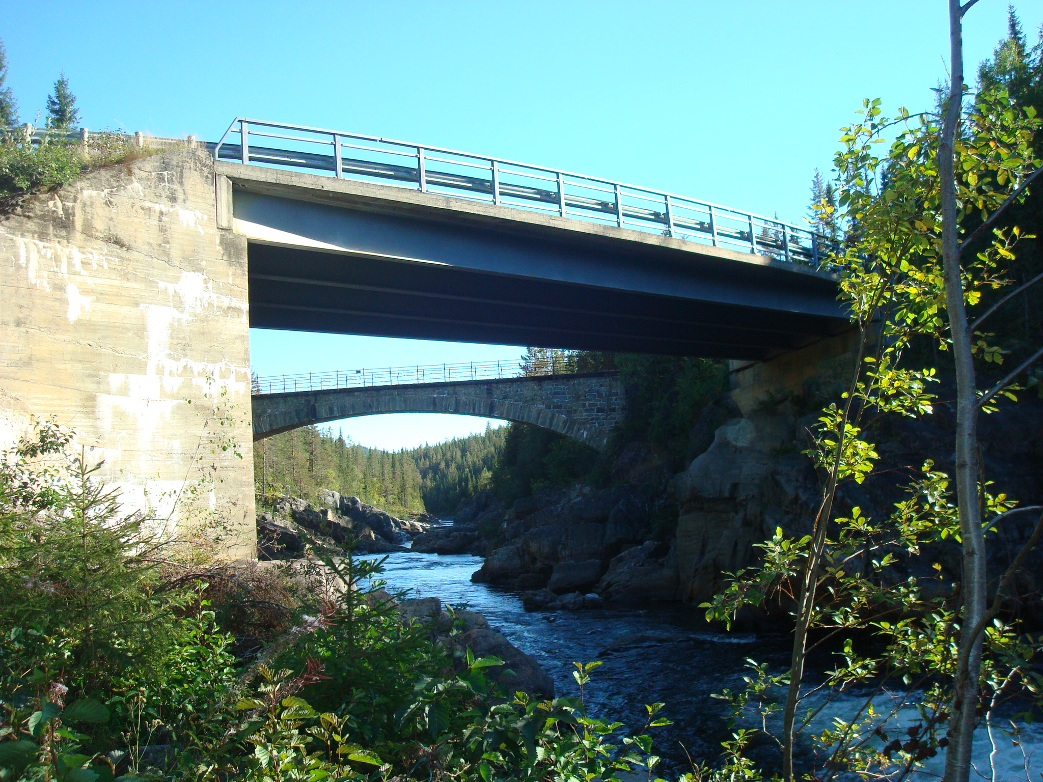 Nye Grønvold bru i Torpa med Gamle Grønvold bru i bakgrunnen.